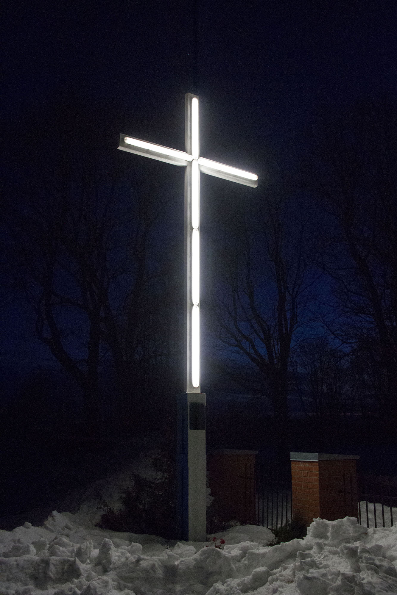 Mīlestības krusts